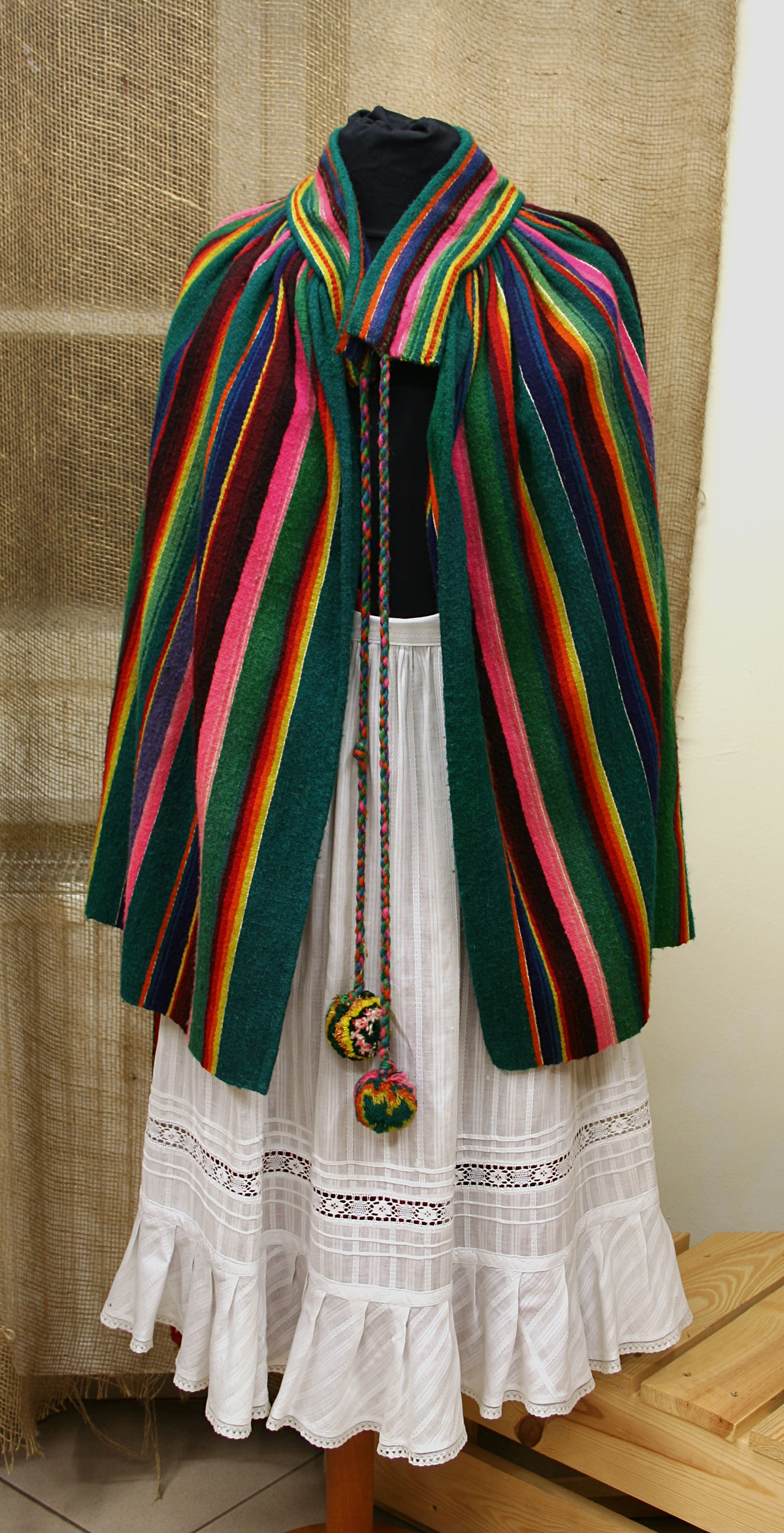 Strój ludowy z okolic Częstochowy, wystawa w Muzeum Częstochowskim